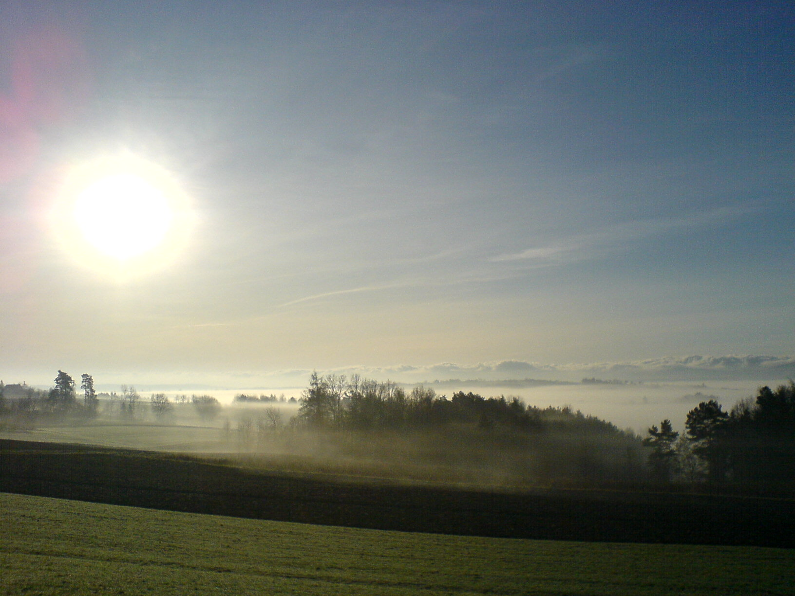 Mgła - Podkarpacie.